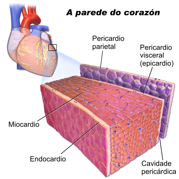 A parede do corazón e o miocardio